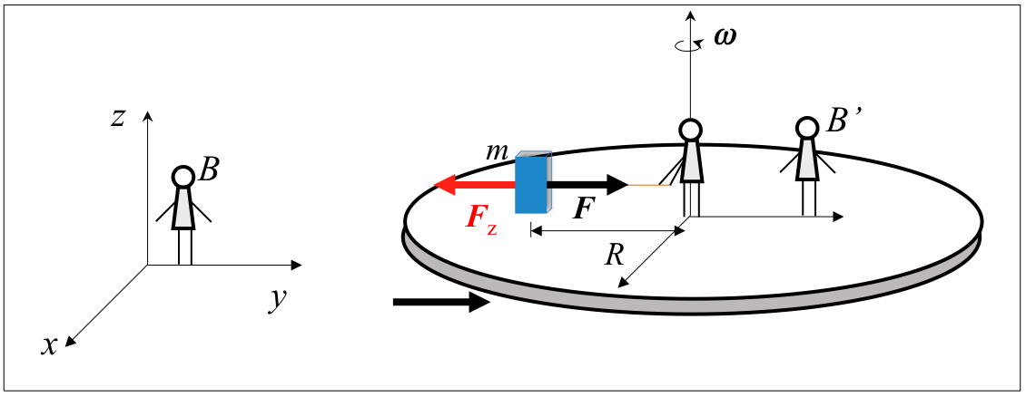 Biraka ari den plataformako erreferentzia-sistema ez-inertzalaren eskema